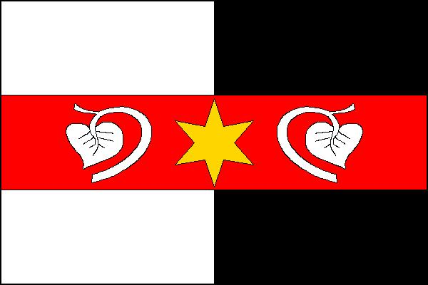 Vlajka obce Tuchlovice